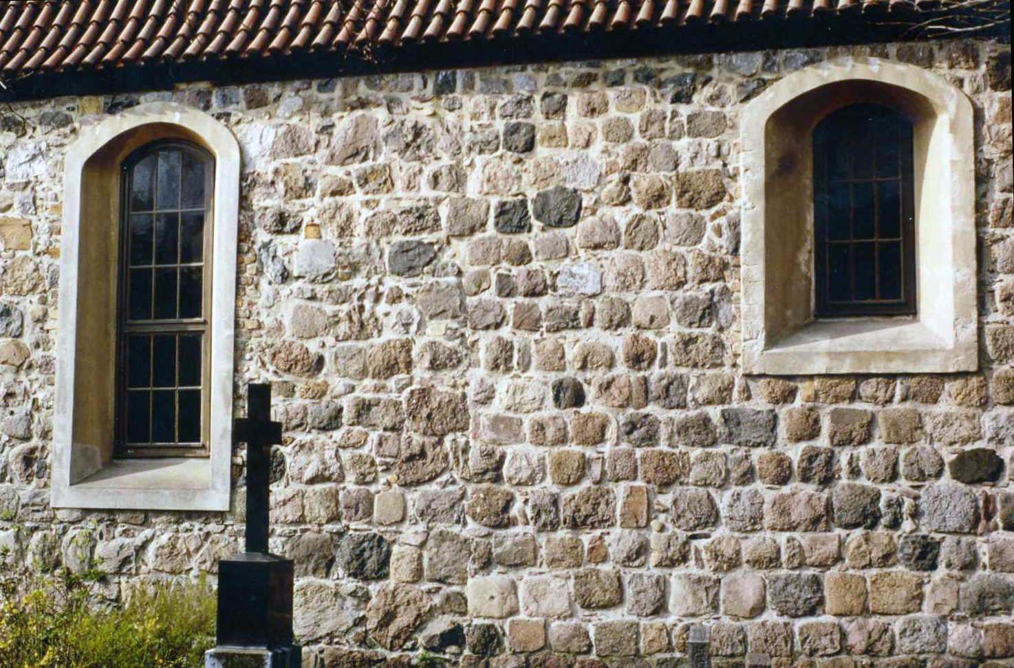 Feldsteinmauerwerk der Dorfkirche (Berlin-)Giesensdorf. Deutlich erkennbar ist eine Baunaht zwischen zwei Bauabschnitten (s. Anmerkung).